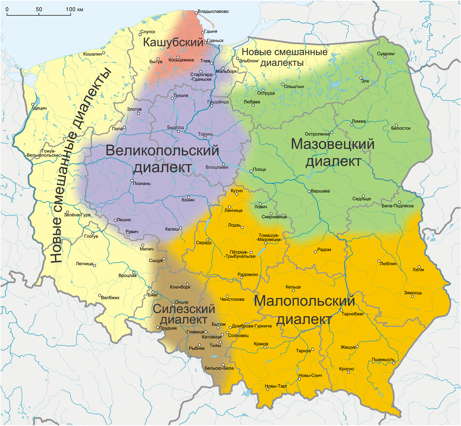 Карта распространения польских диалектов и кашубского языка на основе работ С. Урбанчика с изменениями и дополнениями